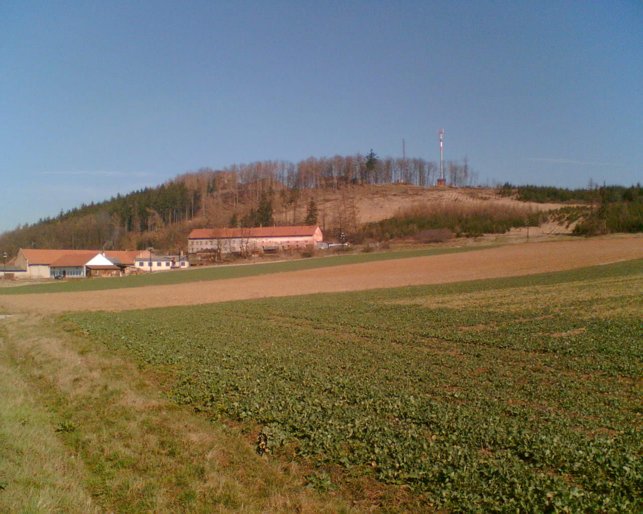 pohled na Cimburk od jihu